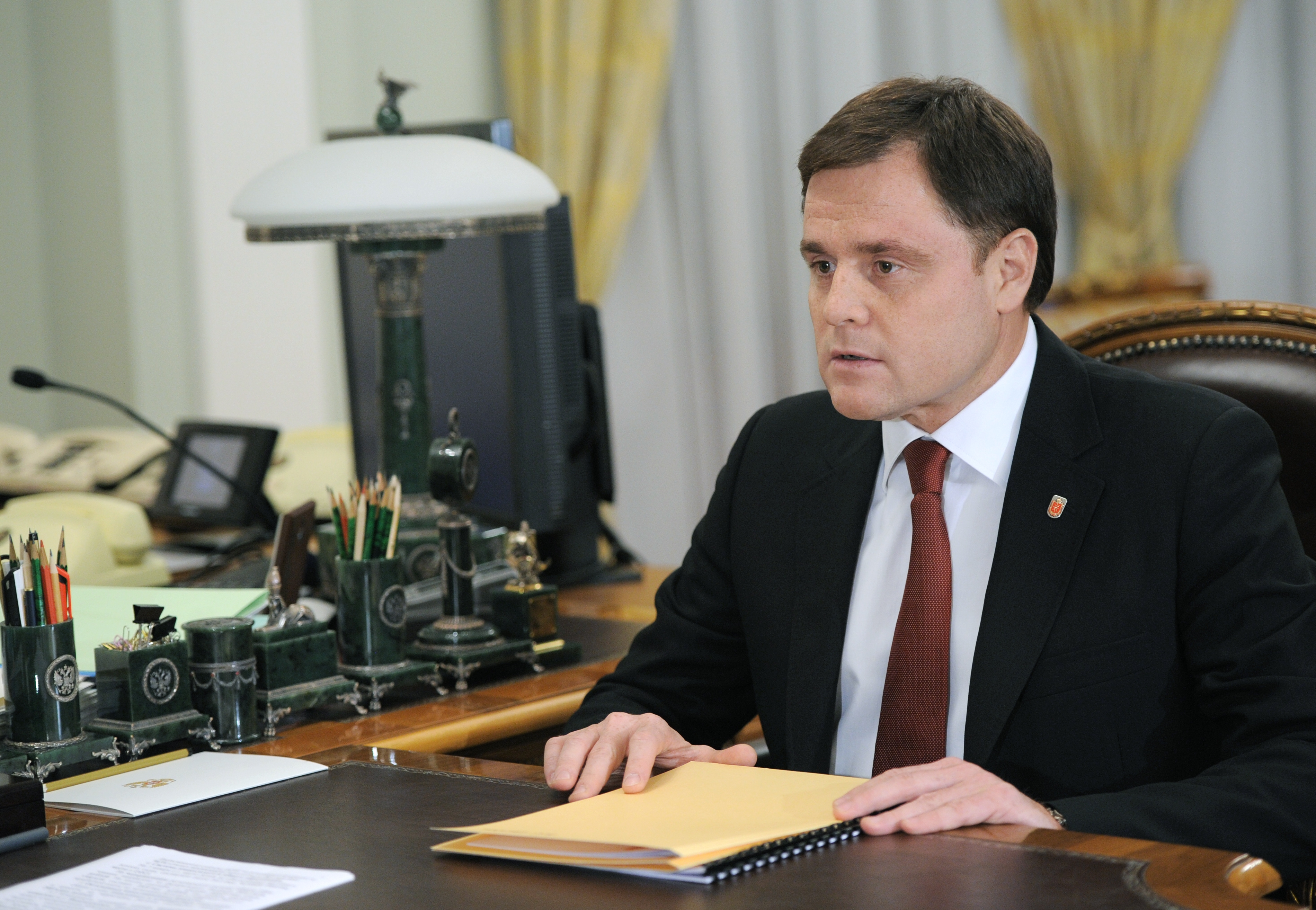 Губернатор Тульской области В. С. Груздев на встрече с Председателем Правительства Российской Федерации В. В. Путиным